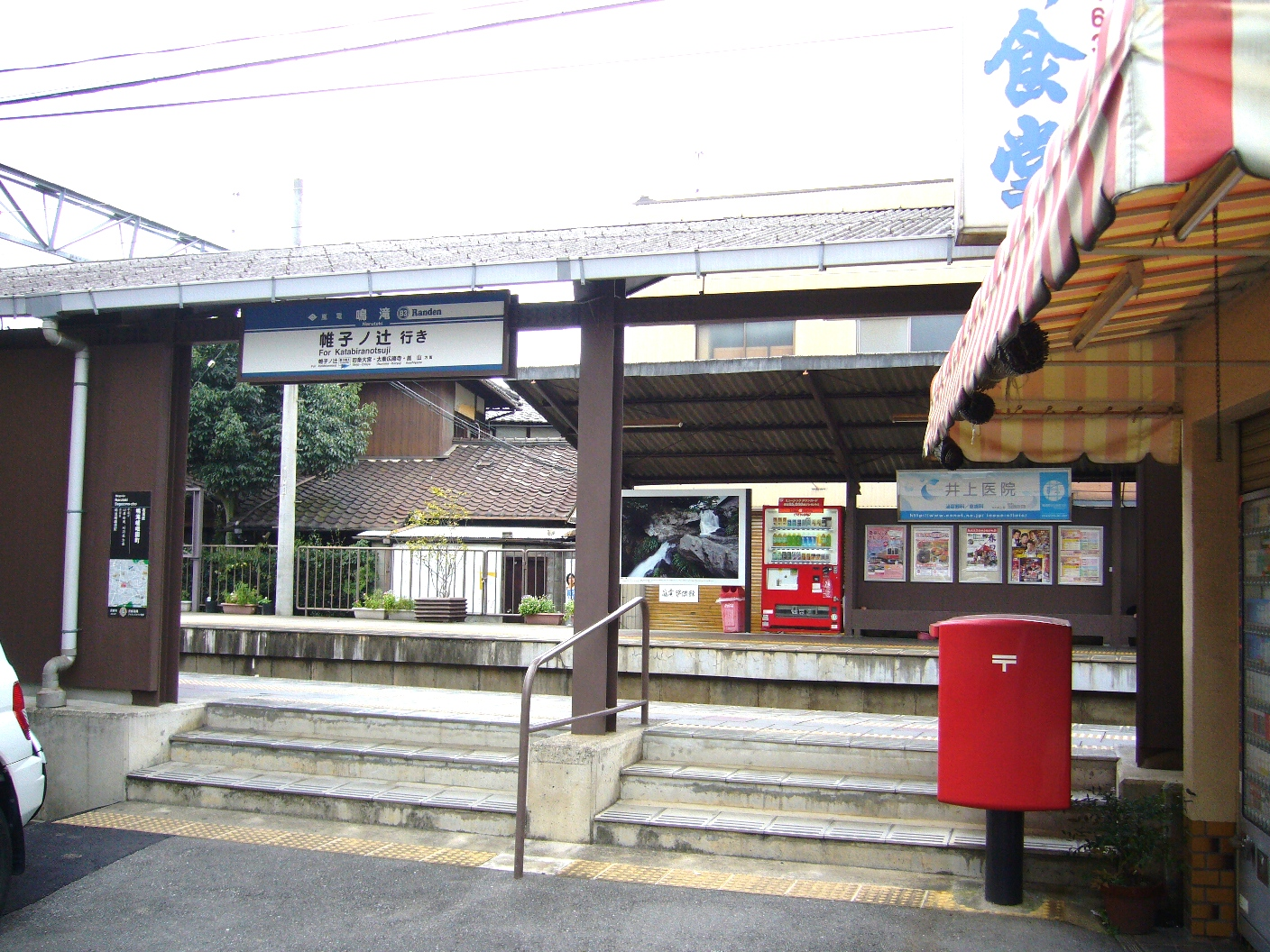 京都市右京区にある京福電気鉄道北野線鳴滝駅の帷子ノ辻方面行きホームへの入口。向こうに見える北野白梅町方面行きホームには「嵐電界隈館」の写真パネルや「シンボルツリー」が植えられた木製の植木鉢も見える。2007年10月3日に投稿者が撮影。